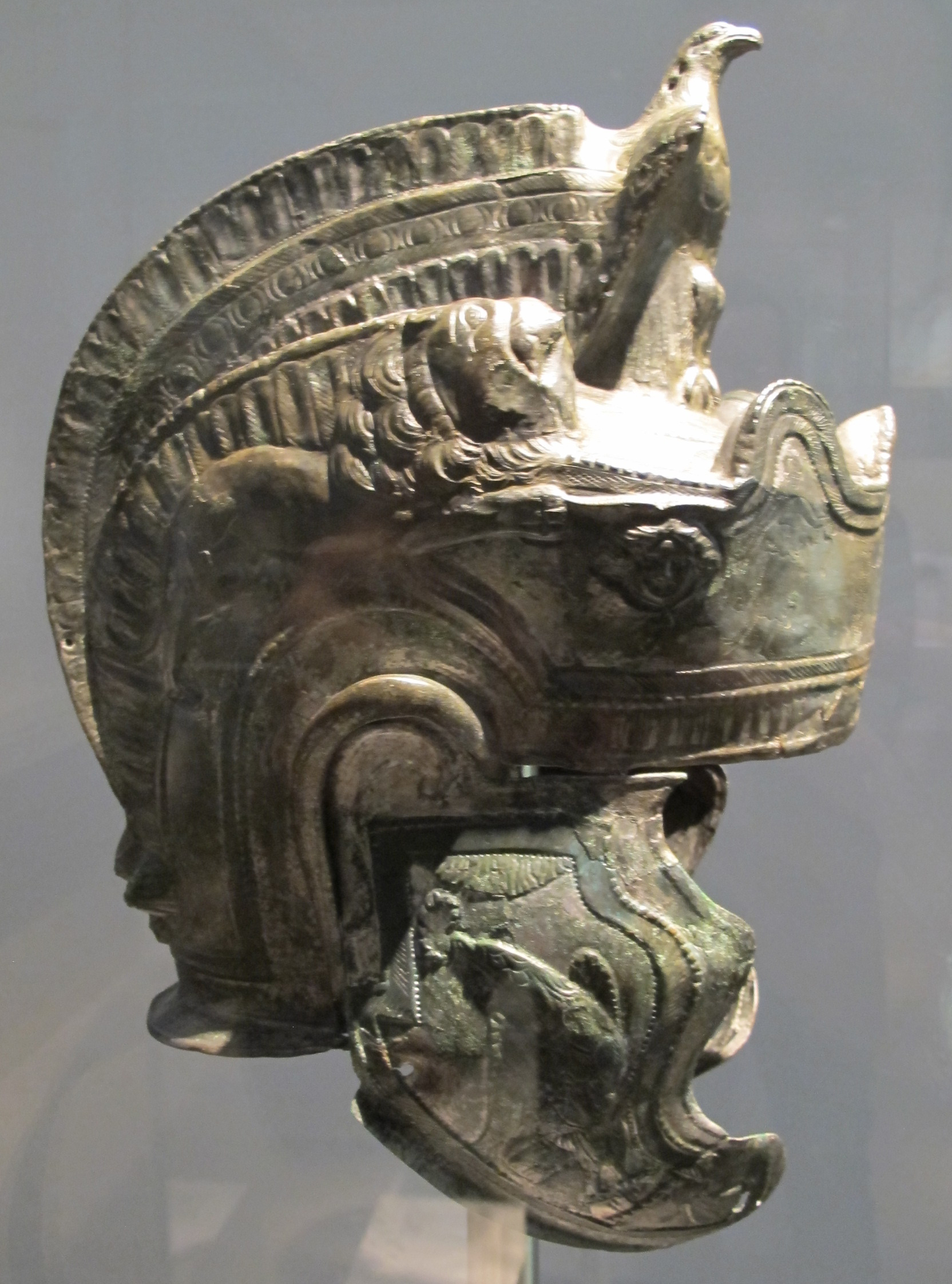 Elmo da parata, bronzo, da Theilenhofen (Iciniacum), 150-200 ca